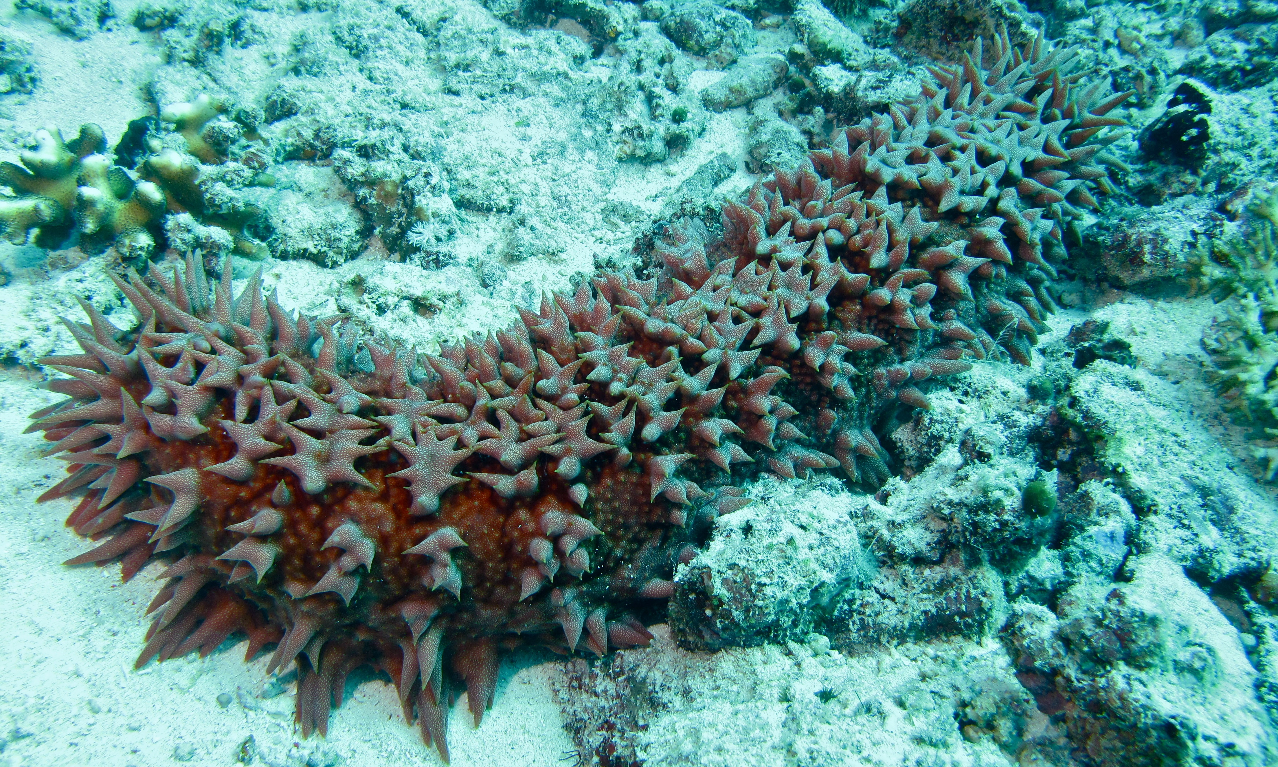 Barracuda Point, Pulau Sipadan, Sabah, MALAYSIA